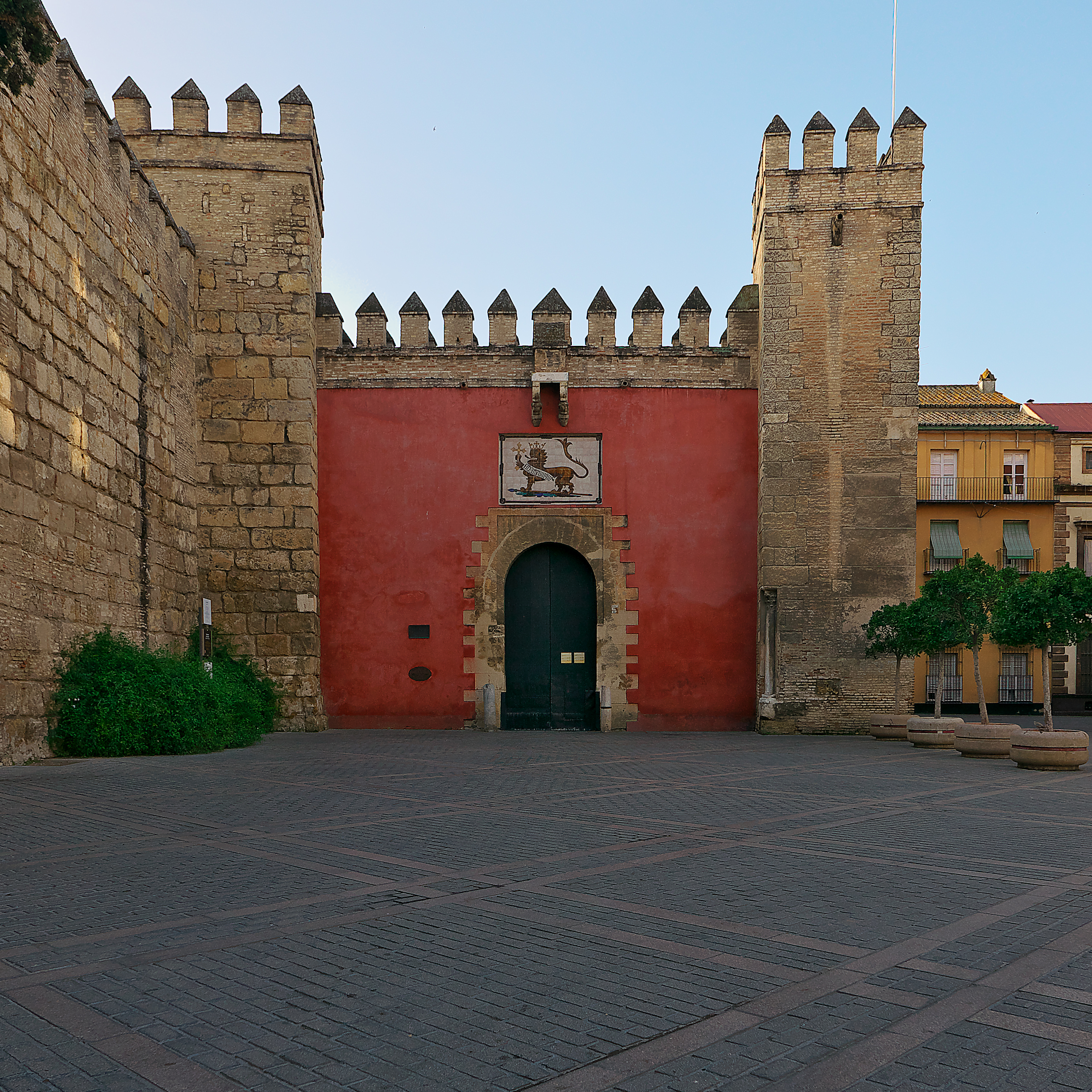 La puerta principal del Alcázar que accede al Patio del León.